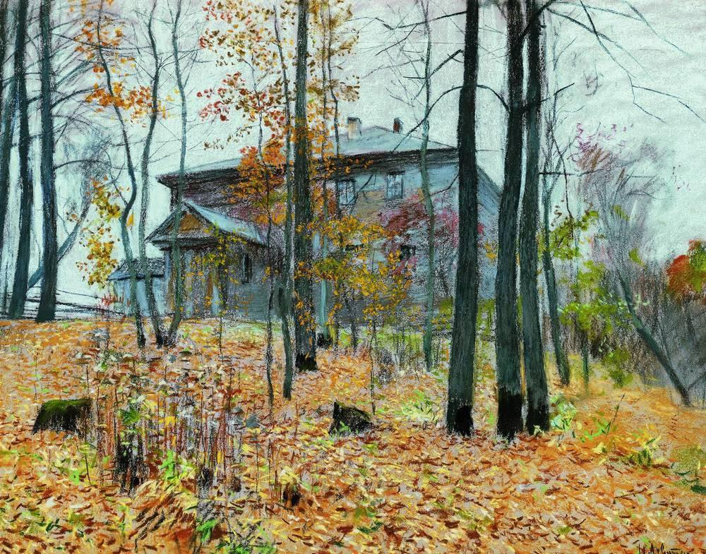 Осень. Усадьба